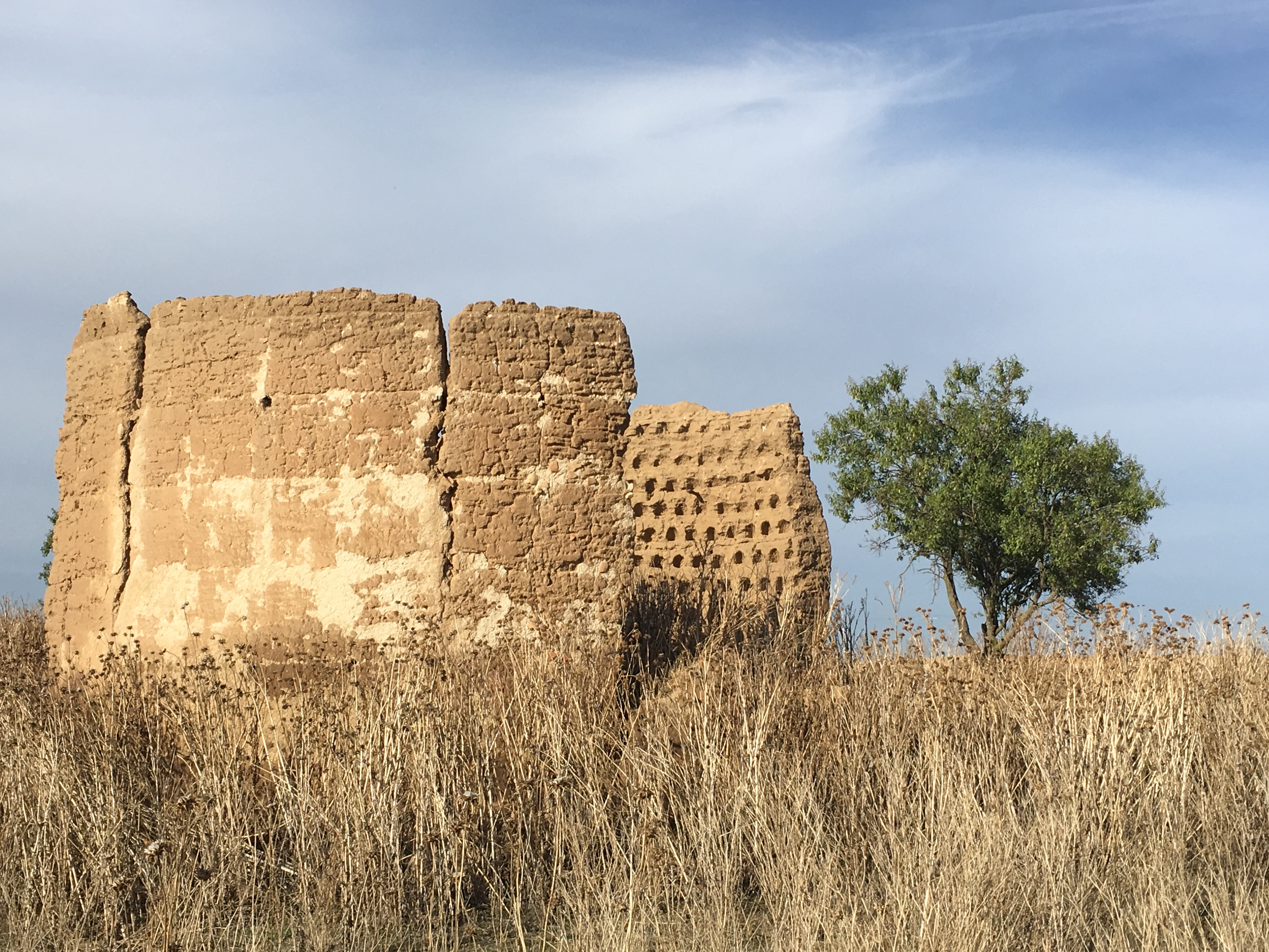 Villaesper Milenario